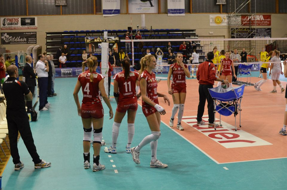 Futura Volley Busto Arsizio nella stagione 2012-13